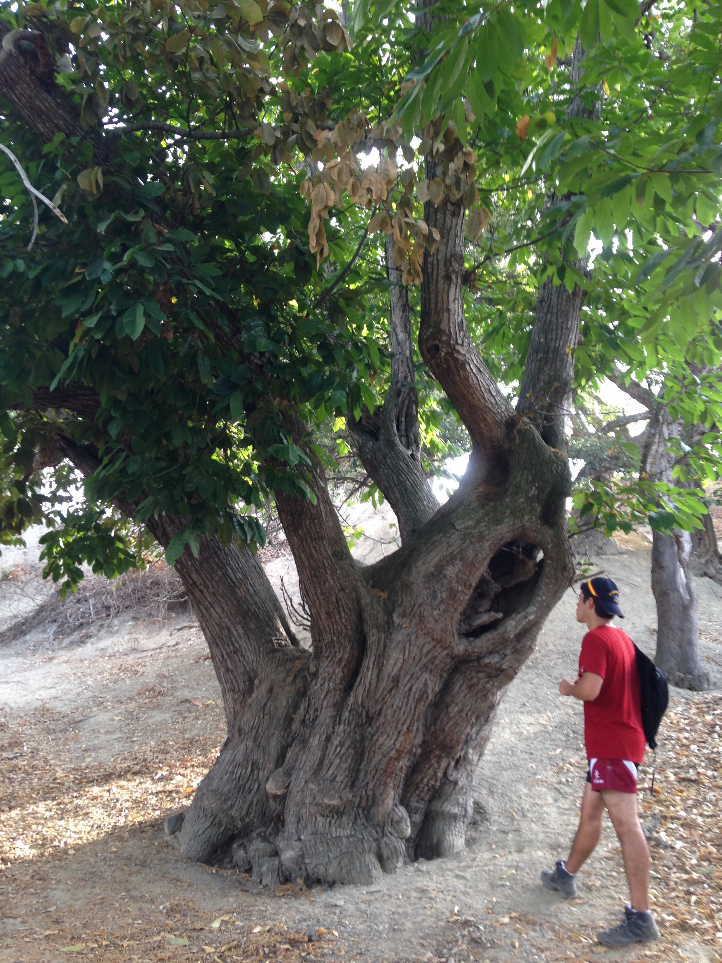 Castanea Sativa en Huerta Serrano, Ceuta, España This is a photography of a Special Area of Conservation in Spain with the ID: ES6310001. Natura2000 entry, EEA entry